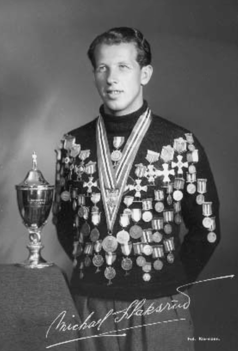 Michael Staksrud